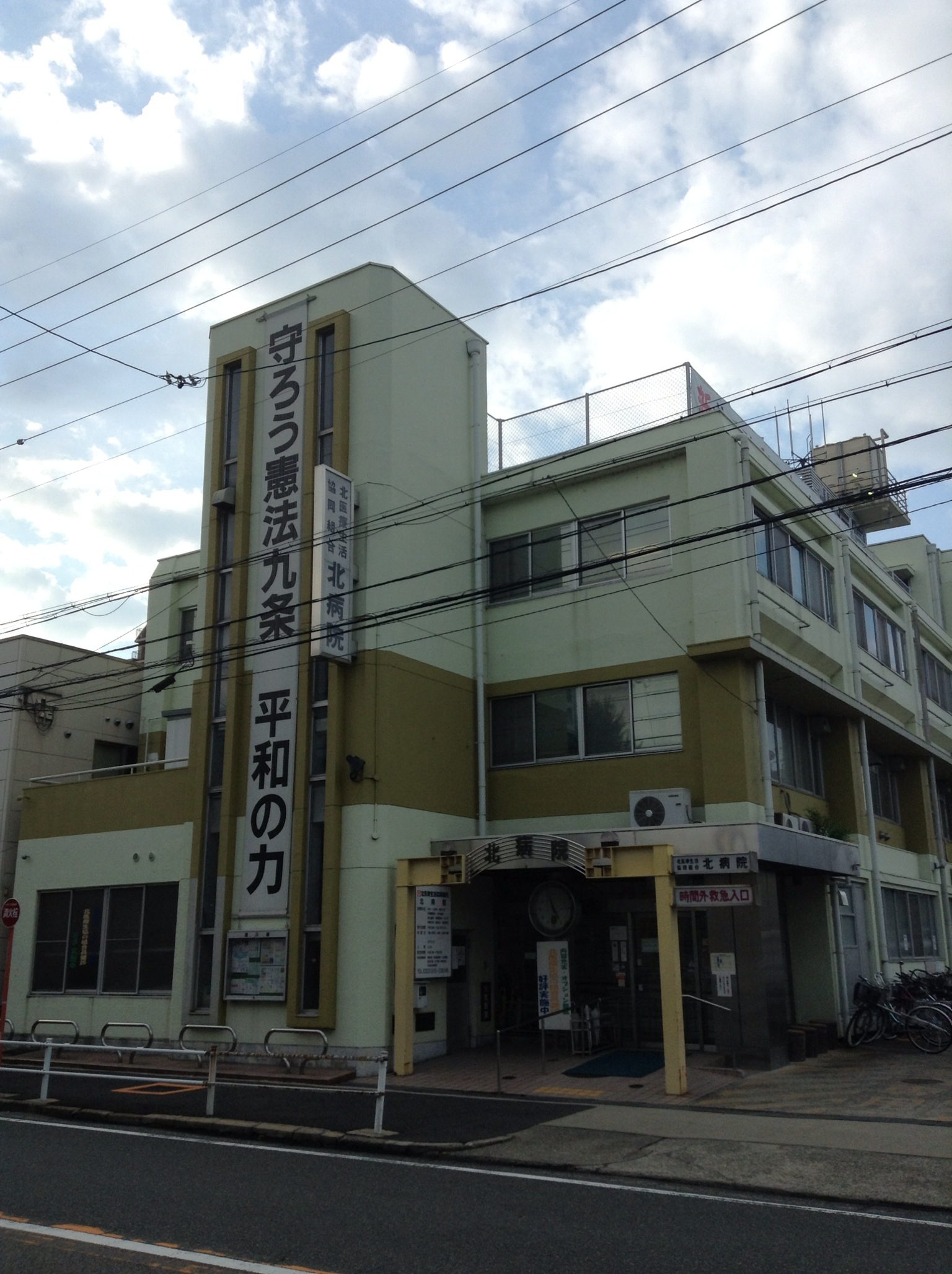 名古屋市北区にある北病院を南側から写す